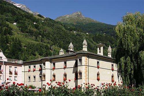 Palazzo de Bassus - Mengotti (Museo Poschiavo) in Poschiavo